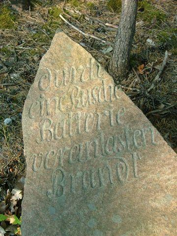 Pomnik z 1813 roku w Szprotawce